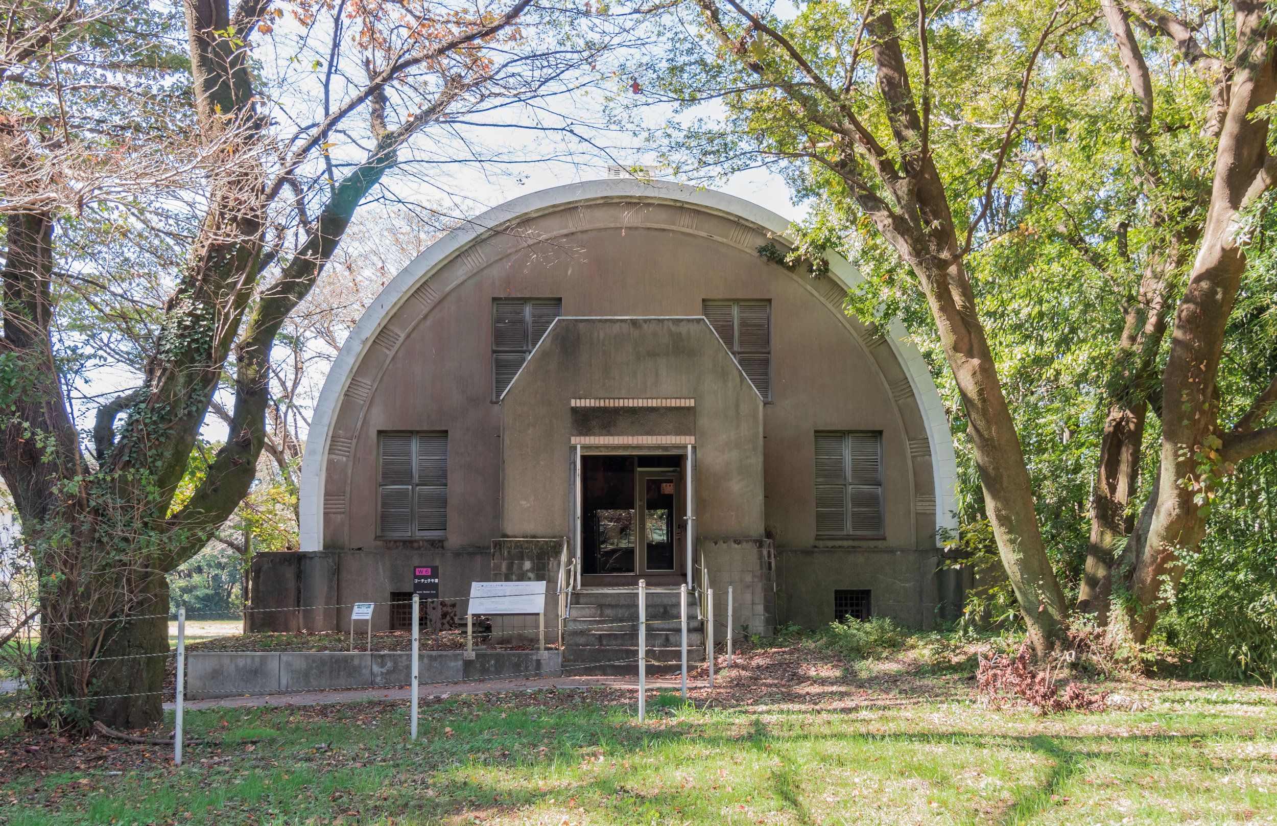 国立天文台、三鷹キャンパス。ゴーチェ子午環室（1924）、日本国登録有形文化財。